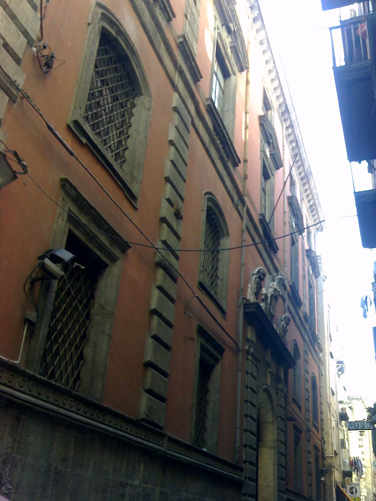 facciata del palazzo del Monte di Pietà (Napoli)